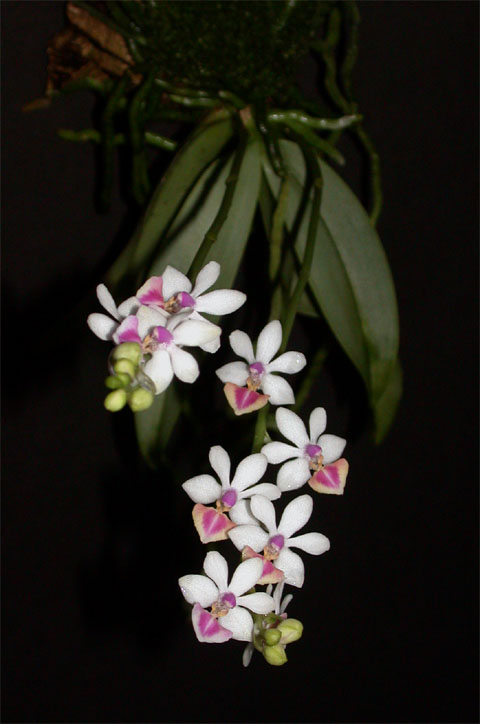 Doritaenopsis Anna-Larati Soekardi